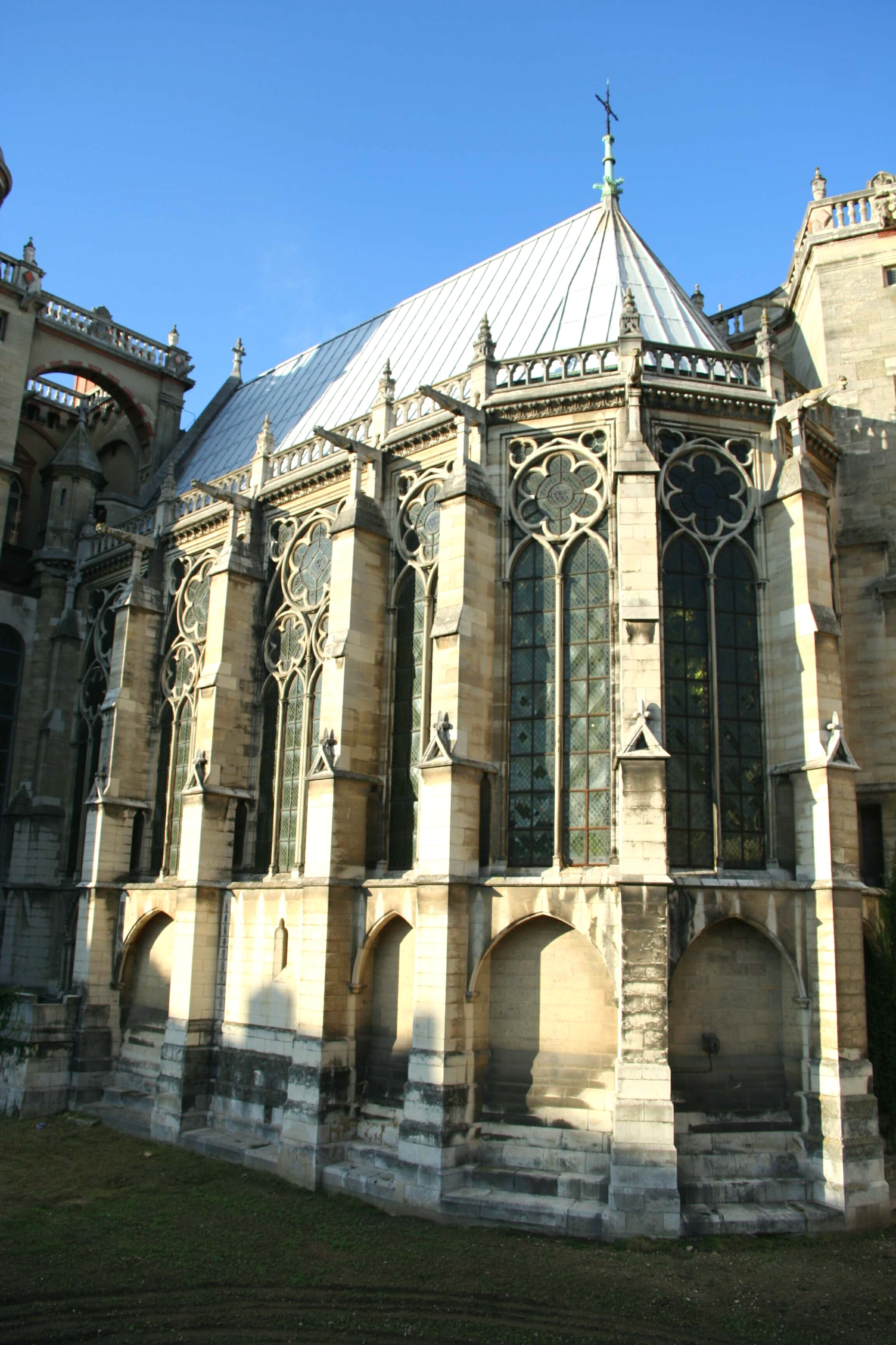 Sainte-Chapelle du château de Saint-Germain-en-Laye - Yvelines (France)